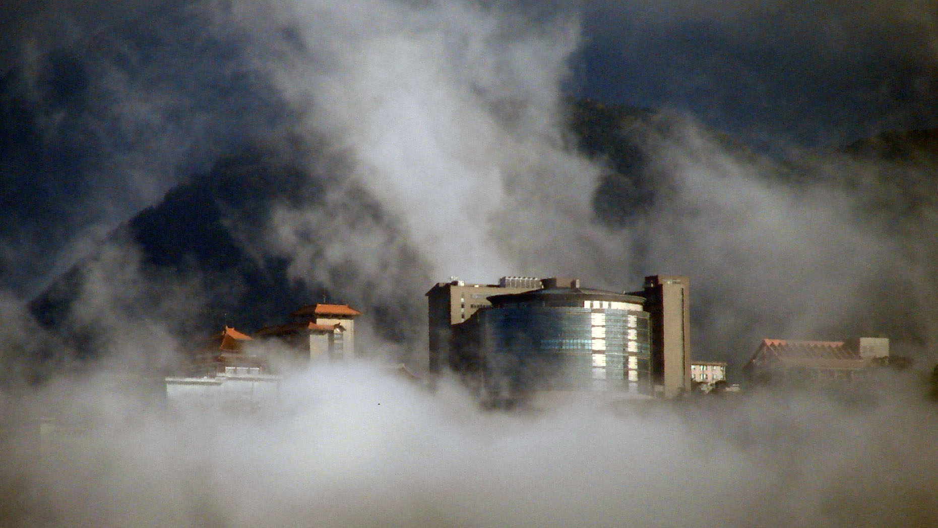 文化大學